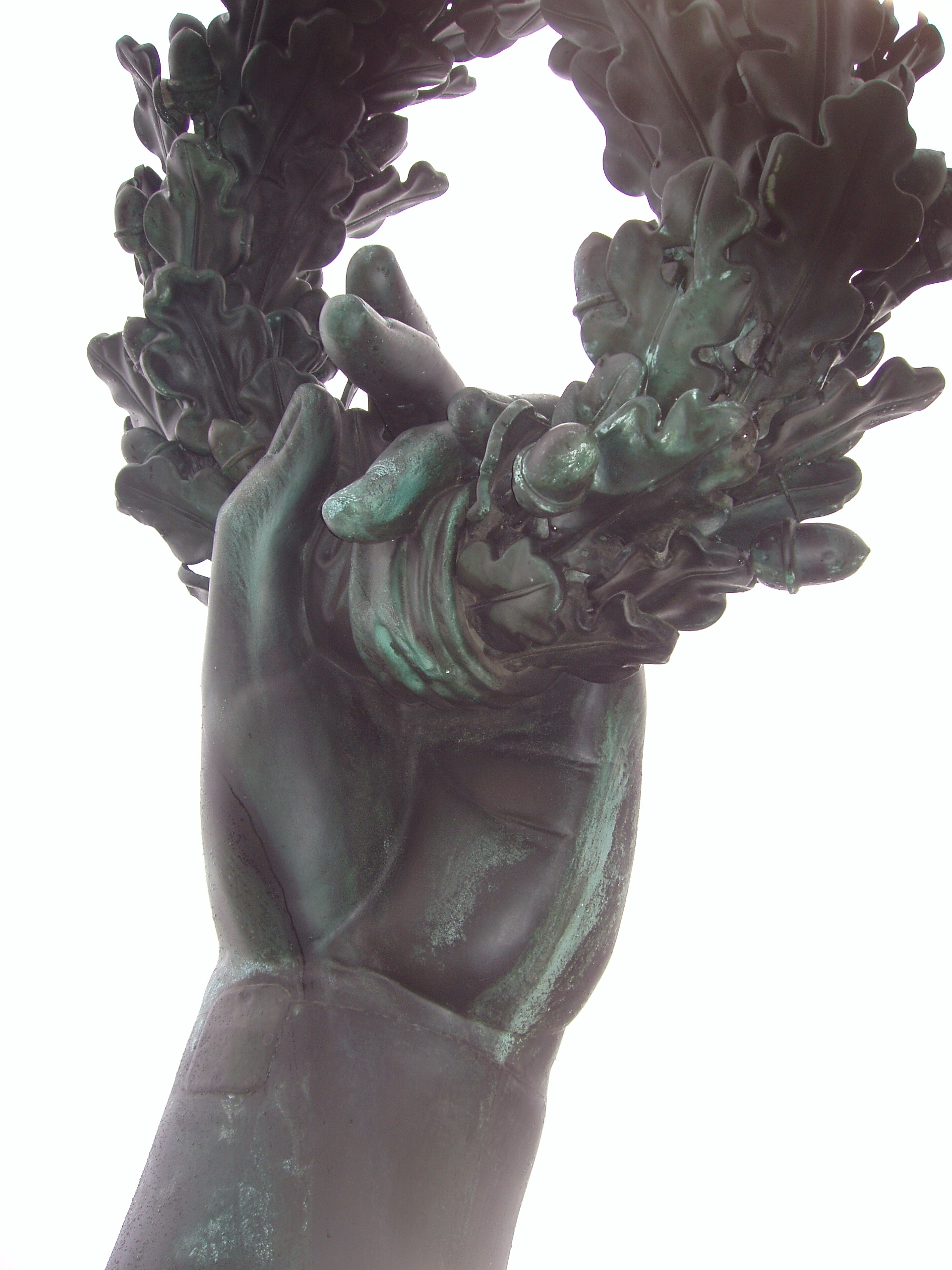 Linke Innenhand der Bavaria mit Lorbeerkranz.